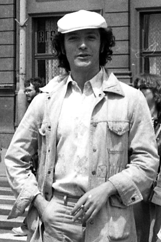 Markó Iván (fehér sapkában)